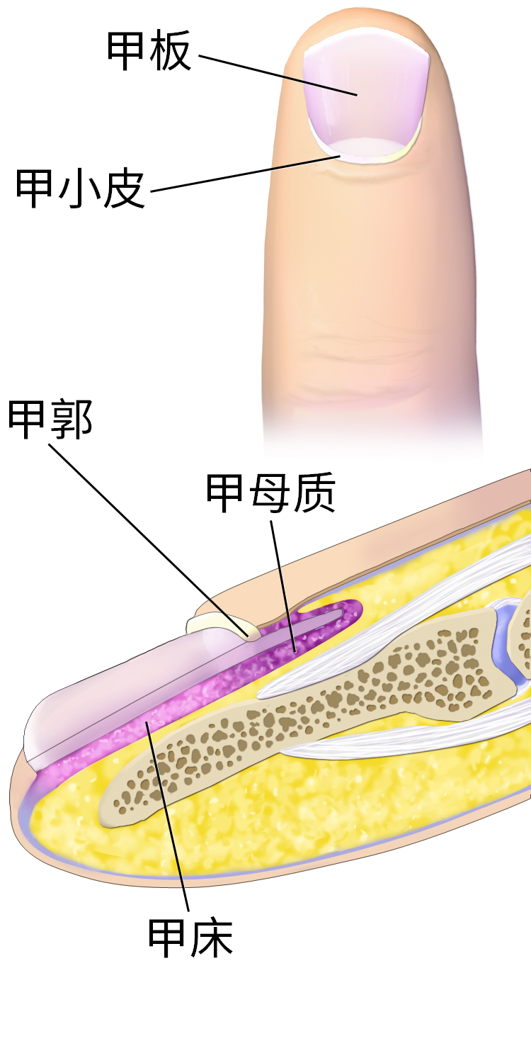 指甲。关于该医学主题的完整信息请见此。